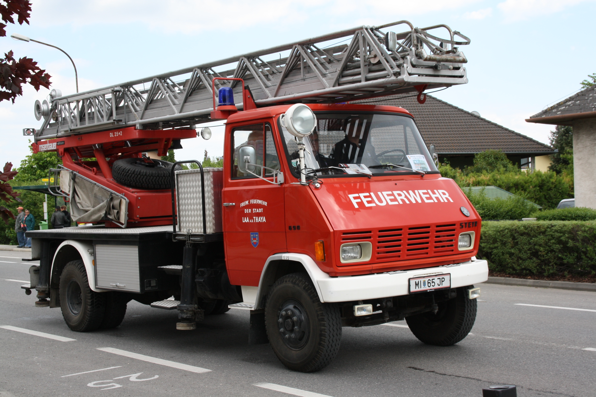 Steyr 690 Einsatzfahrzeug der Feuerwehr Laa an der Thaya